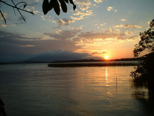 Golfo Dulce al atardecer